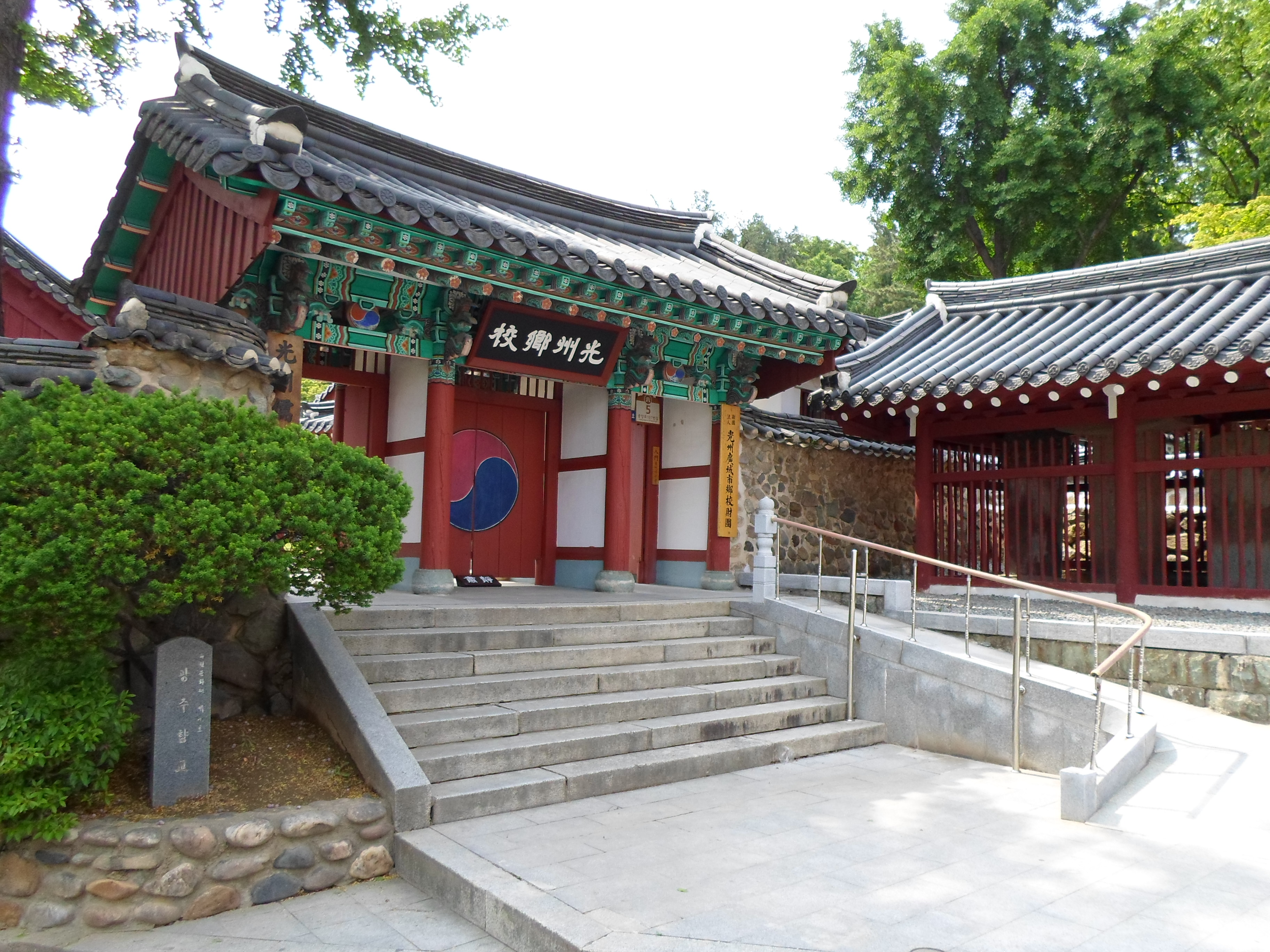 광주광역시 유형문화재 제9호 광주향교(光州鄕校).